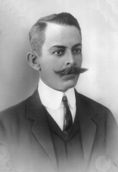 Retrato do professor e educador brasileiro, João de Deus, pai dos escritores João Baptista, e Julio Cesar de Mello e Souza, mais conhecido pelo seu pseudônimo Malba Tahan.